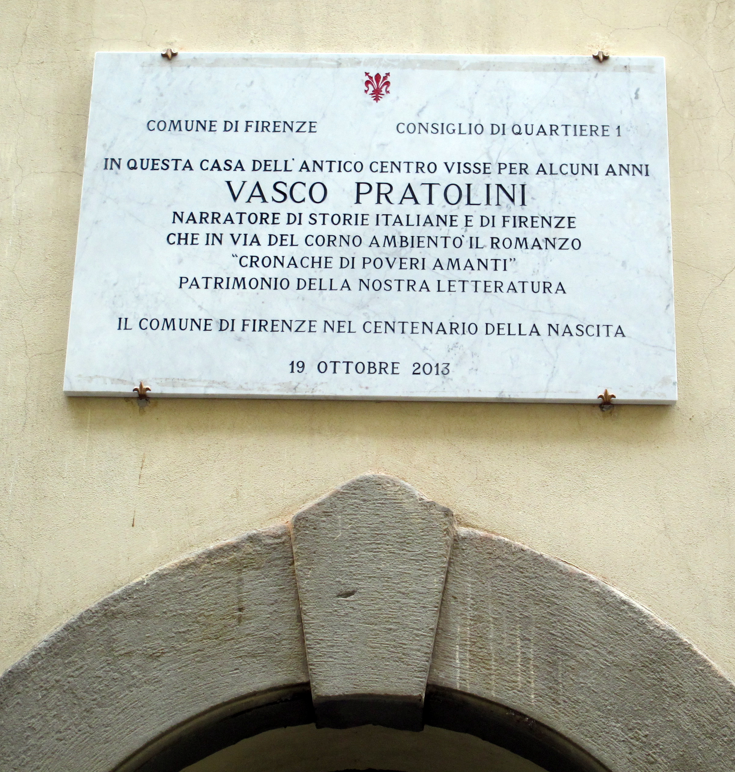 Via del corno, lapide centanario vasco pratolini, 2013